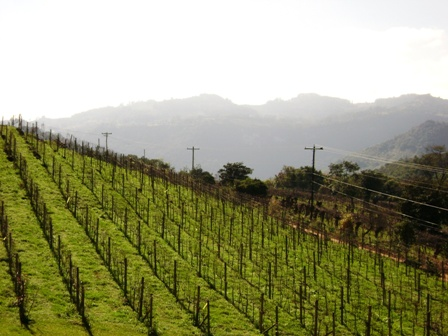 Paisagem de parreiral do Vale dos Vinhedos, em Bento Gonçalves, em julho de 2007.